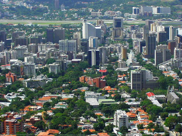 Altamira from El Avila, Chacao Municipality, Miranda State, Venezuela.